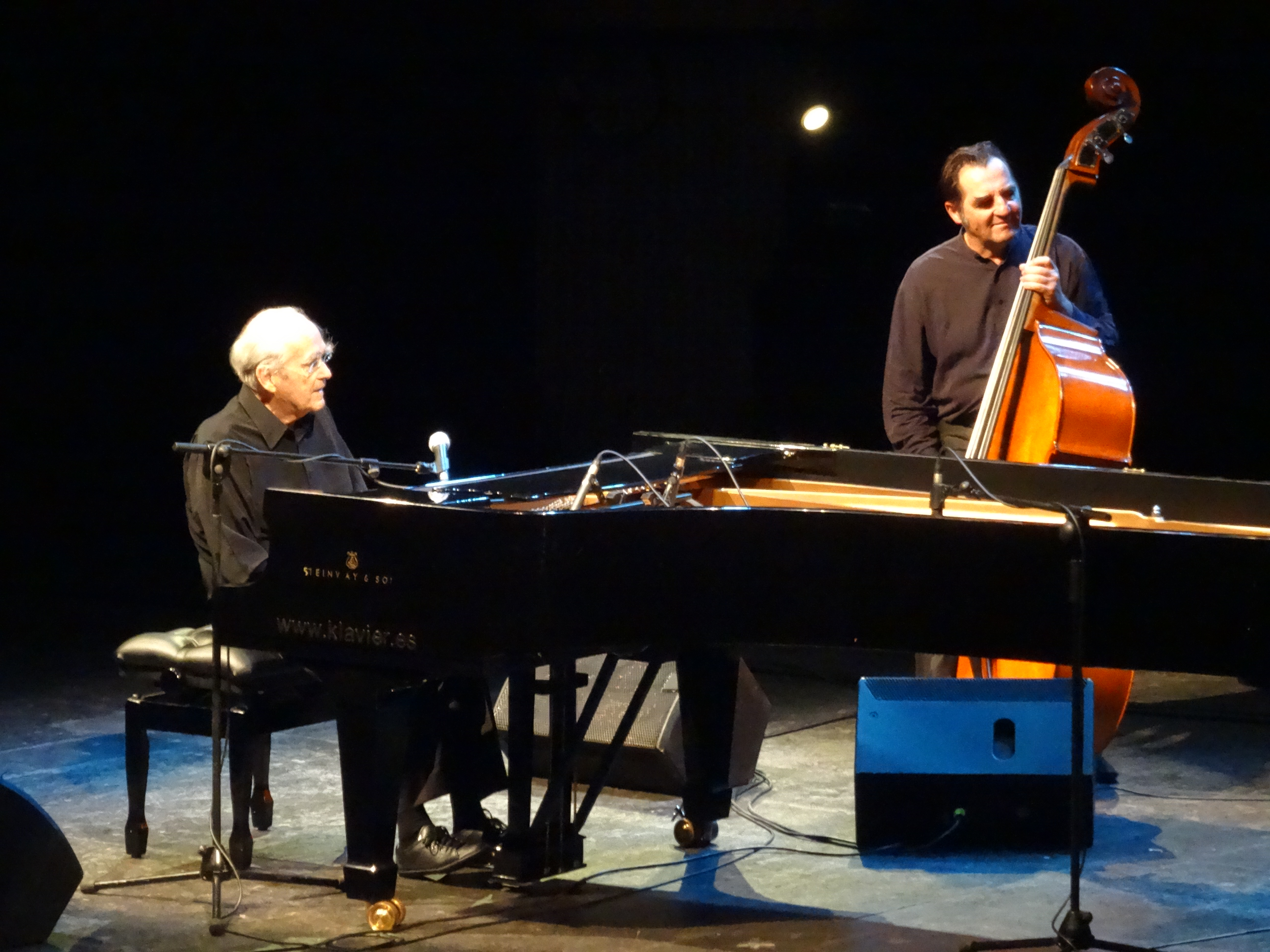 Michel Legrand, concierto de clausura de la XX edición del Festival Internacional de Jazz de San Javier (30 de julio de 2017)